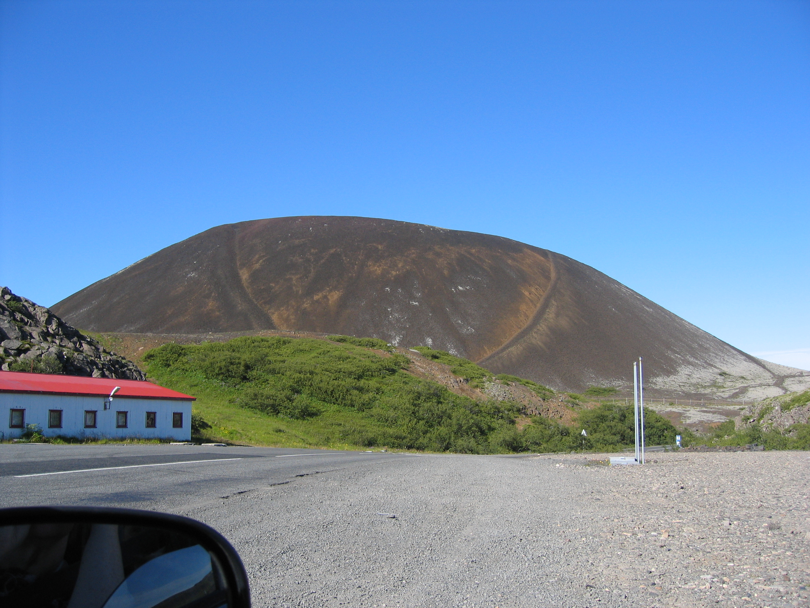 Grábrók, Borgarfjörður, Iceland Salvör Gissurardóttir July 2006